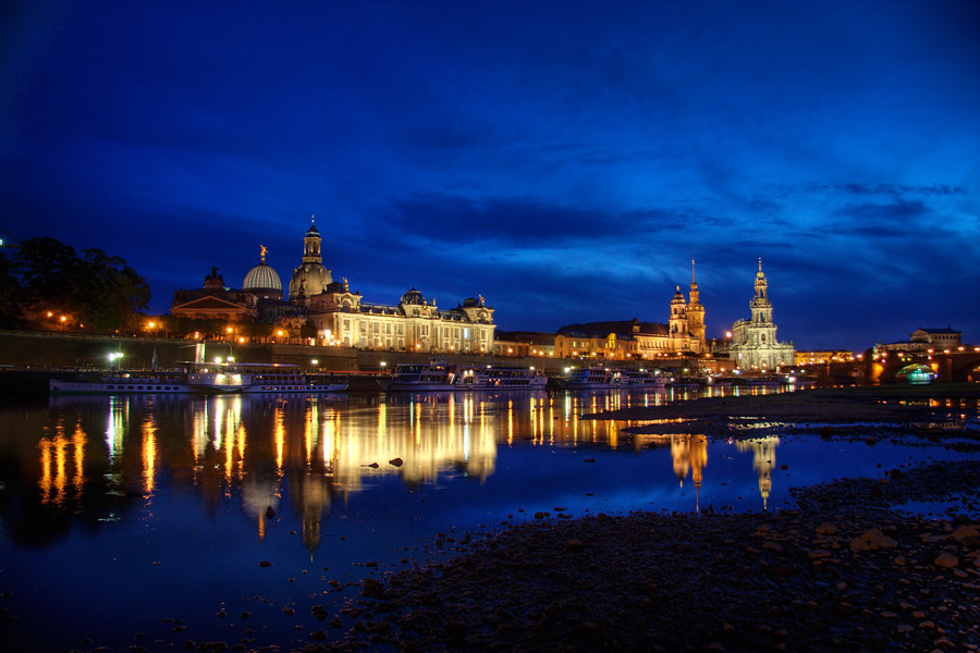 Panorama Dresden-Altstadt